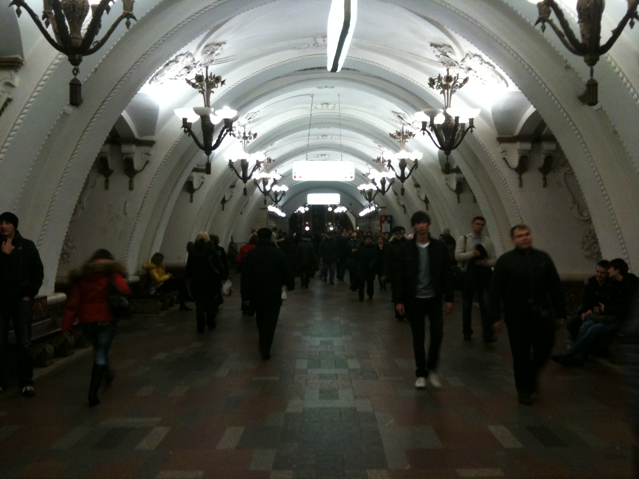 Arbatskaya - APL (Арбатская - АПЛ)